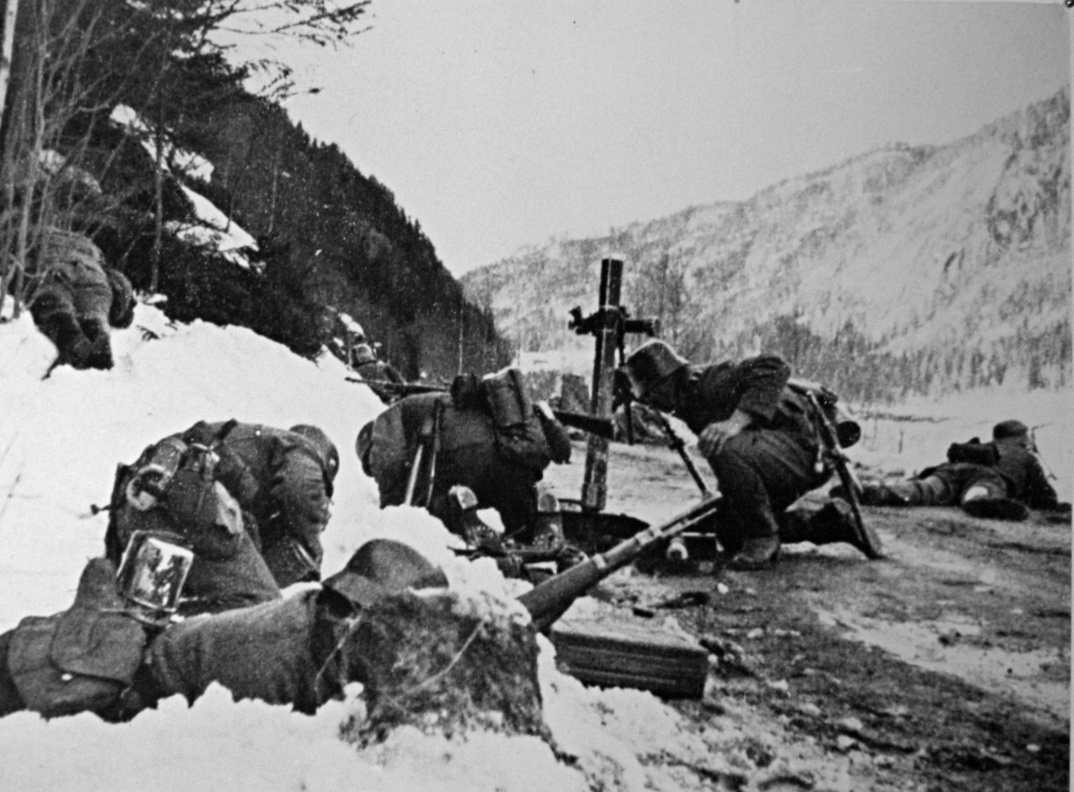 German forces attacking fenrik Kvaals group 18. april with mortars at Leiteberget. See also Kampene langs Randsfjorden, i Ådalen og Valdres.